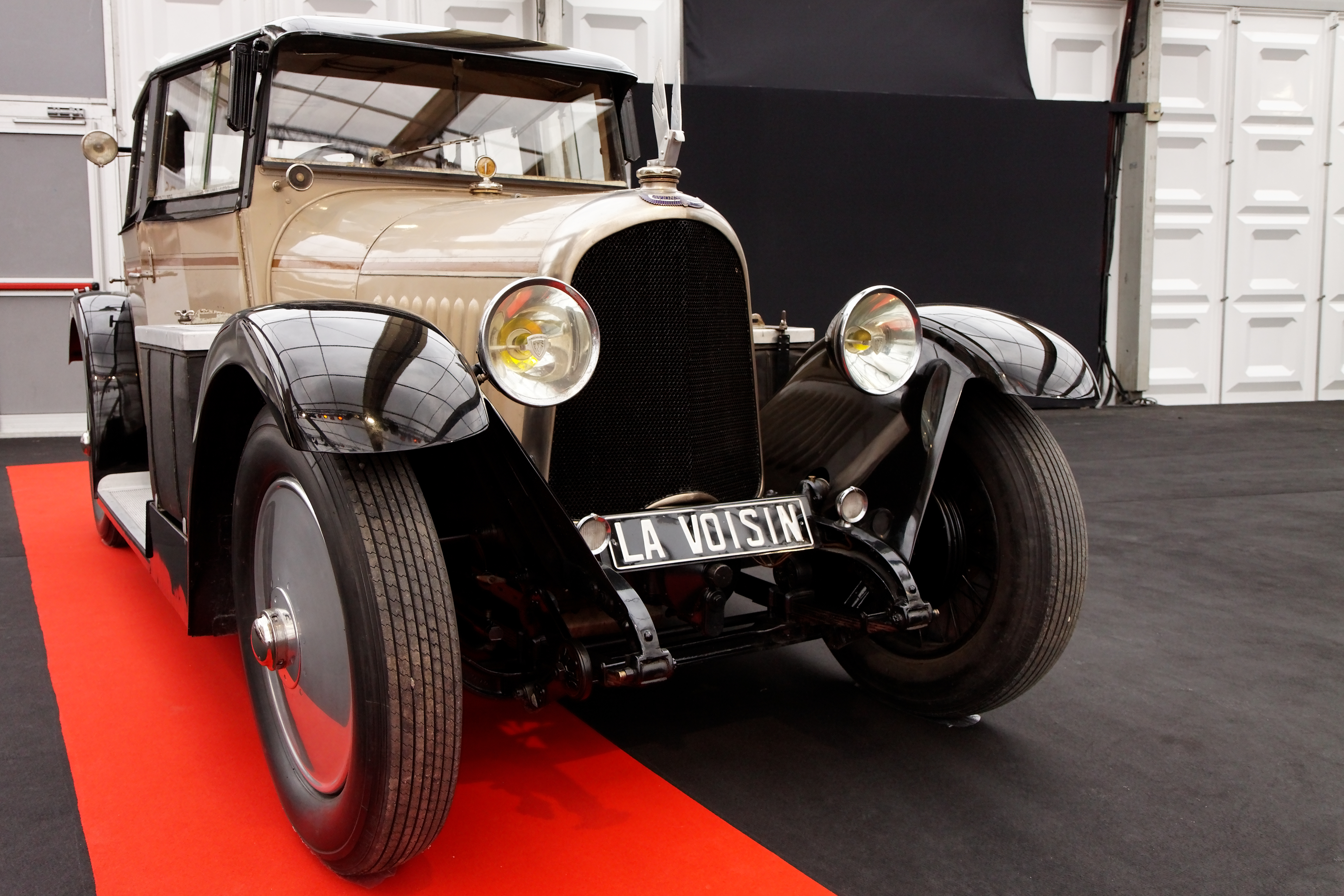 L'Avions Voisin C7 classique exposée devant le dôme des Invalides lors du festival automobile international 2011.